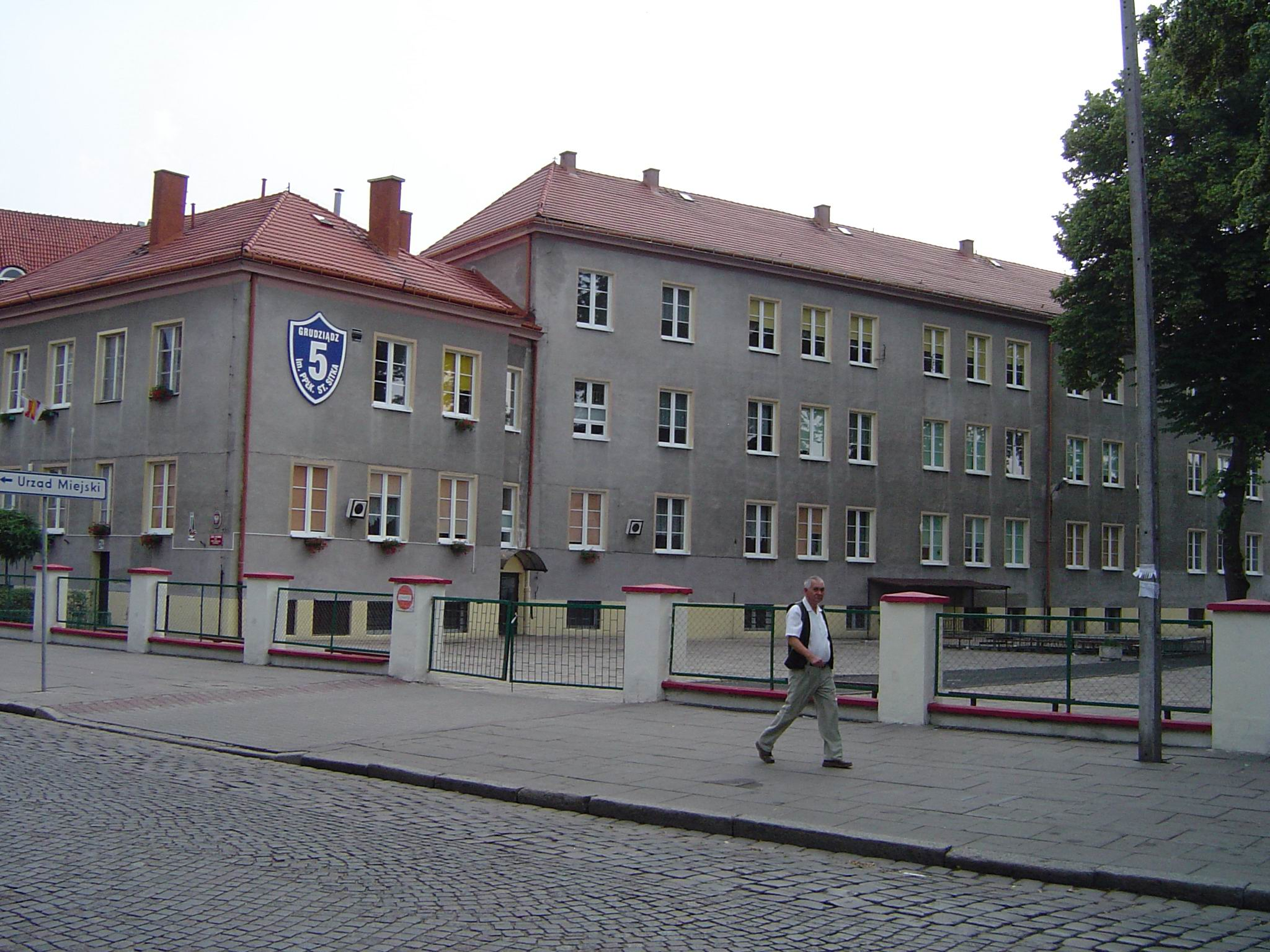 Szkoła Podstawowa nr 5 w Grudziądzu.